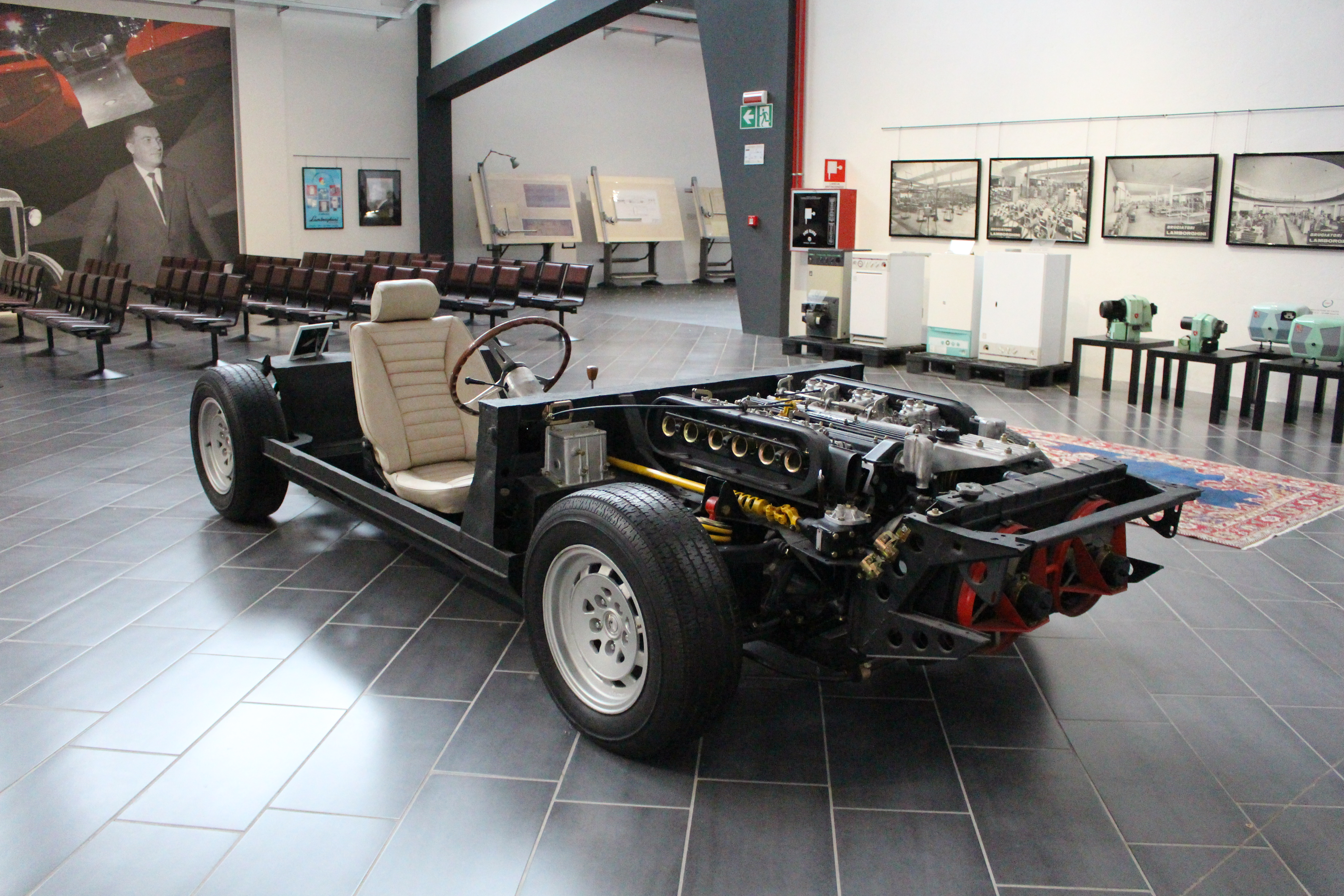 Lamborghini Espada-Chassis